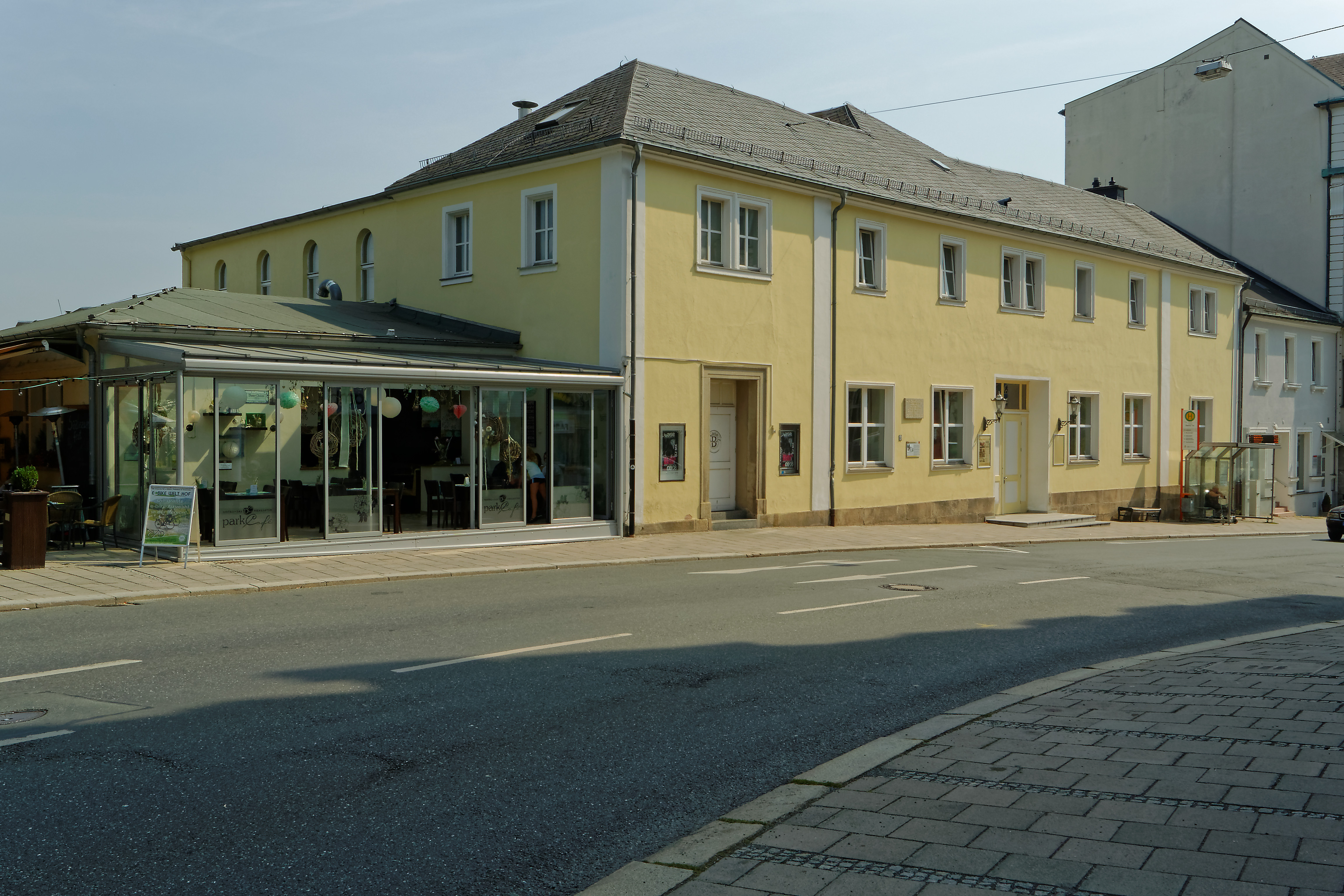 Poststraße 6, Vereinshaus der Bürgergesellschaft, in Hof/Saale mit Denkmal-Nr. D-4-64-000-256 Mehrfach gegliederter zweigeschossiger Walmdachbau, 1848, rückseitig Saalbau, zweigeschossig über hohem Untergeschoss mit exedraförmigem Bühnenhaus, seitlich Zugang über geschlossene Holzveranda, Jugendstil 1900–1914 (Das Gebäude schräg von der Straßenseite Poststraße)This is a photograph of an architectural monument.